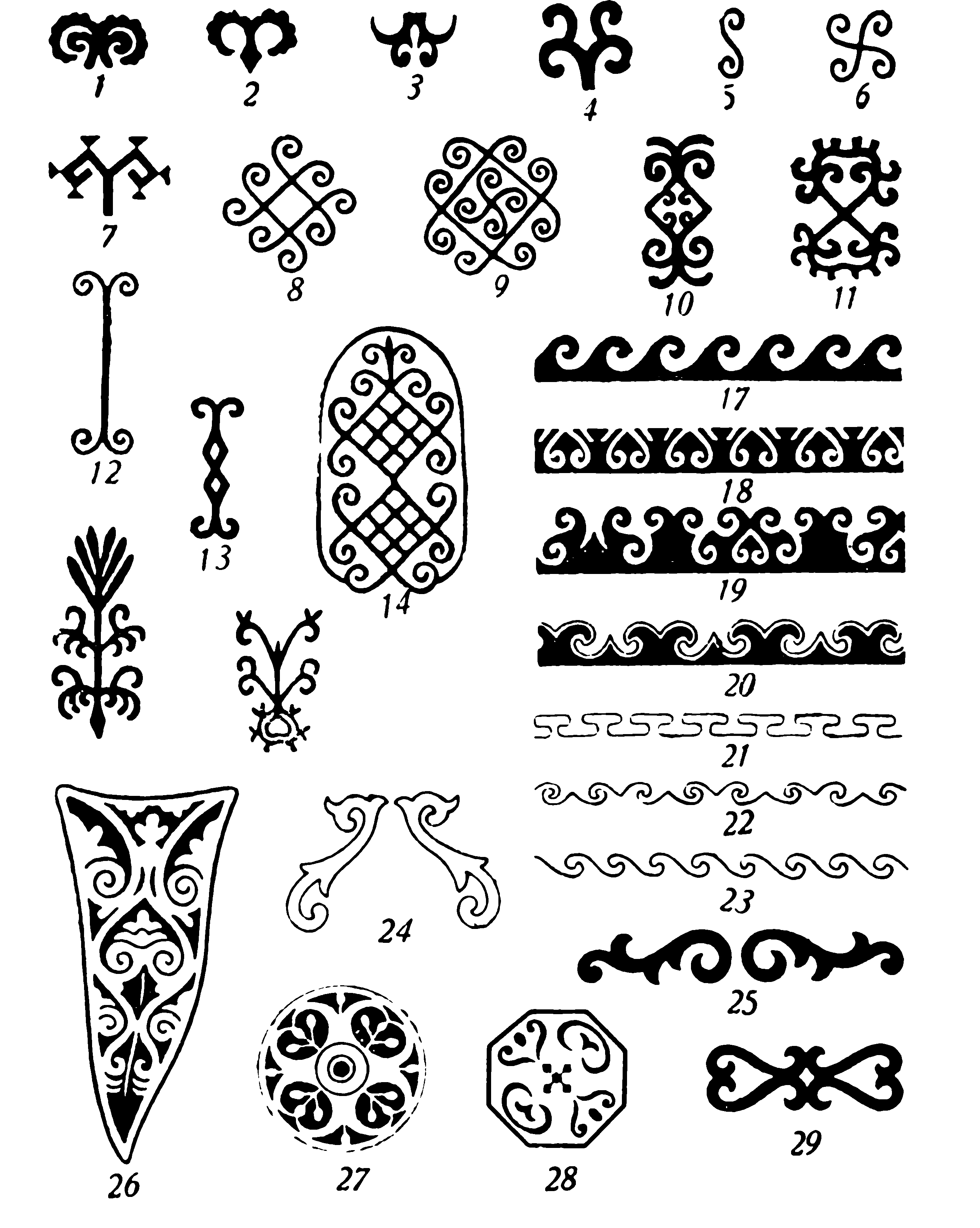 Второй орнаментальный комплекс в башкирском искусстве составляют узоры из различных спиралей, рогообразных и сердцевидных фигур, бегущих волн, пальметок и производные от них более сложные мотивы.